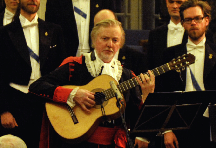 Foto: Lasse Jansson